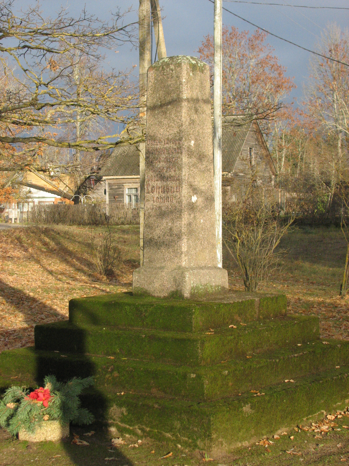 Lohusuu, Estonia